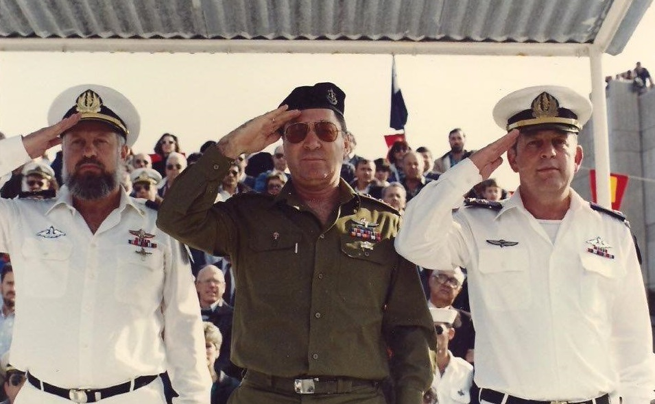 העברת פיקוד חיל הים מאברהם בן שושן משמאל למיכה רם בימין. הרמטכ"ל דן שומרון במרכז פברואר 1989